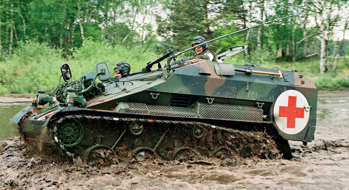 Sanitätstrupp auf Basis Wiesel 2